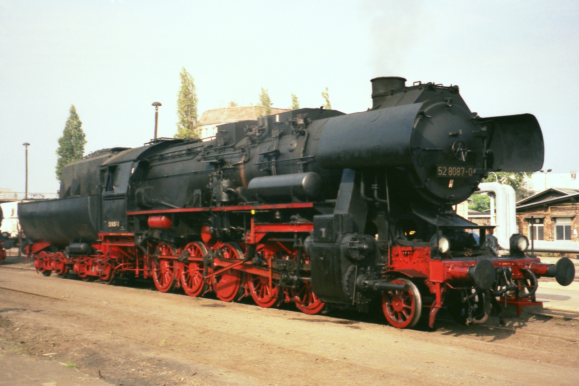 DR 52 8087 im Raw Berlin-Schöneweide.